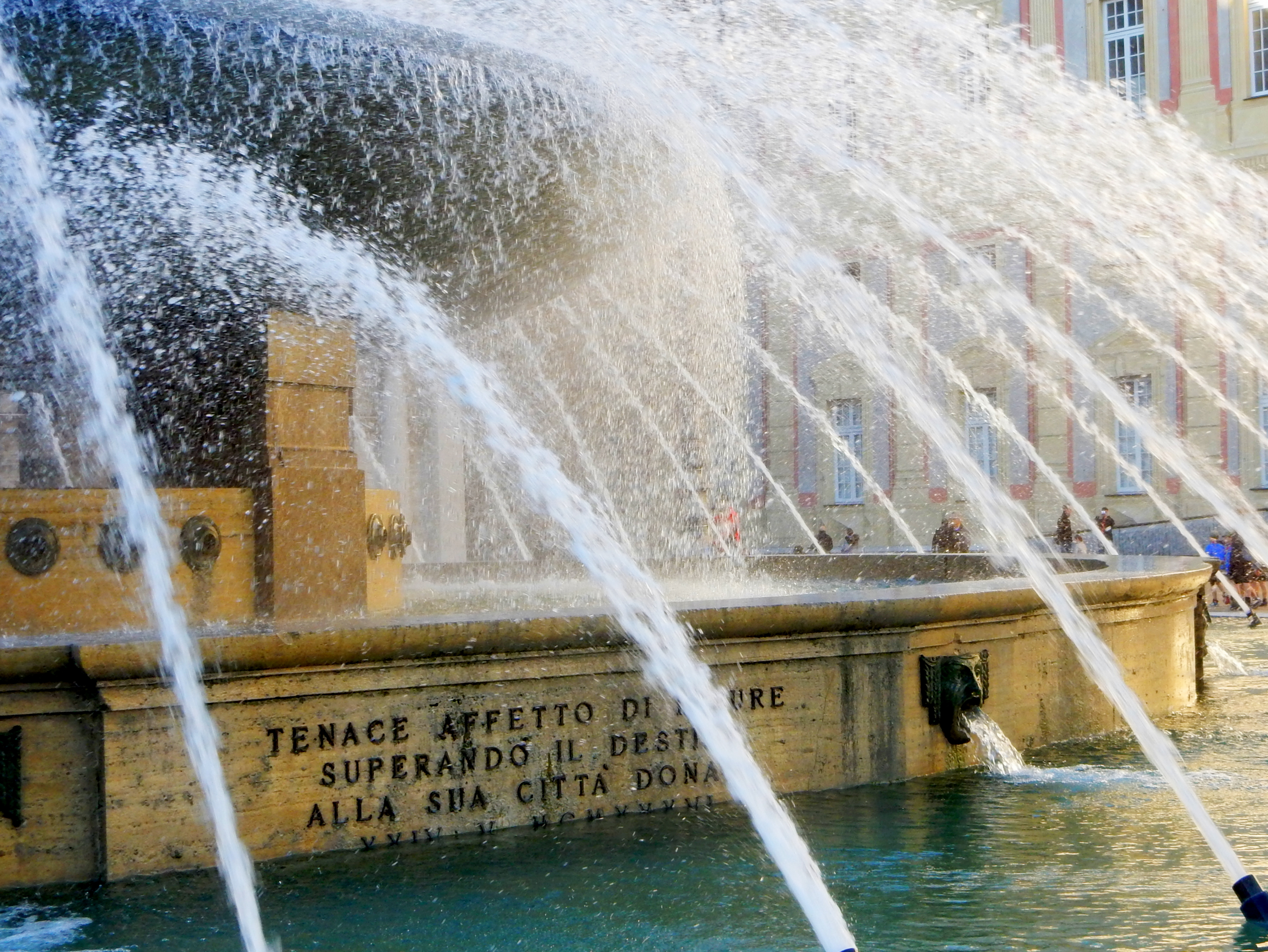 notare la scritta dedicata